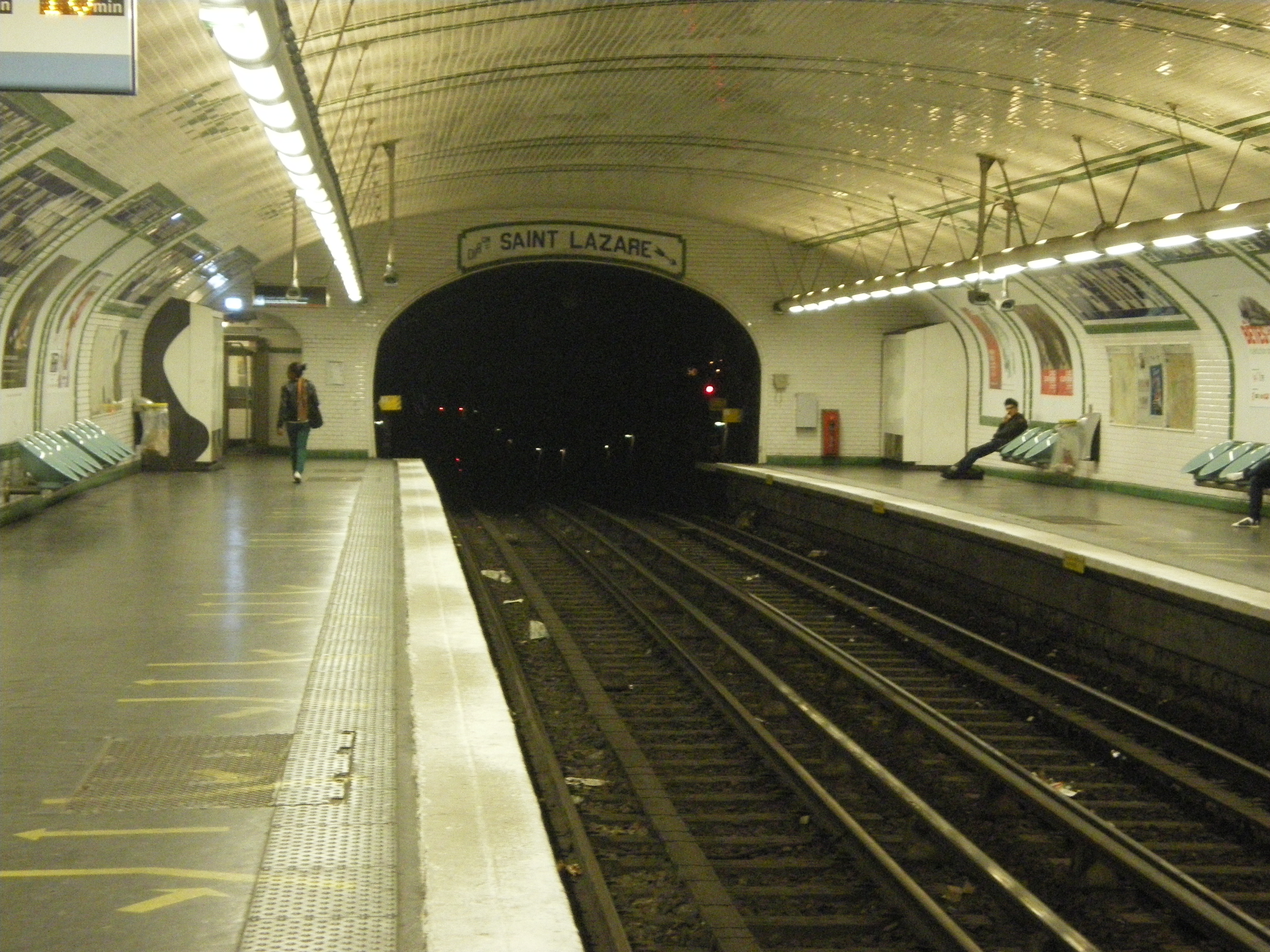 Station de metro porte de Saint-Ouen